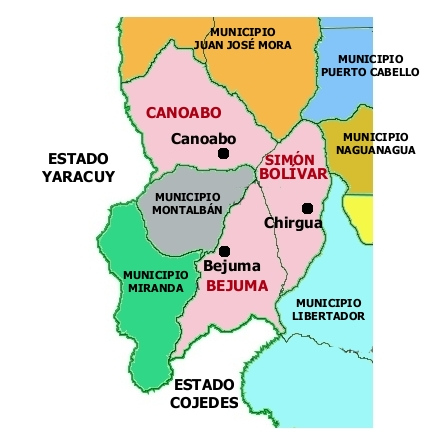 Bejuma municipality